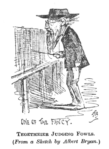 William Bernhardt Tegetmeier judging poultry breeds